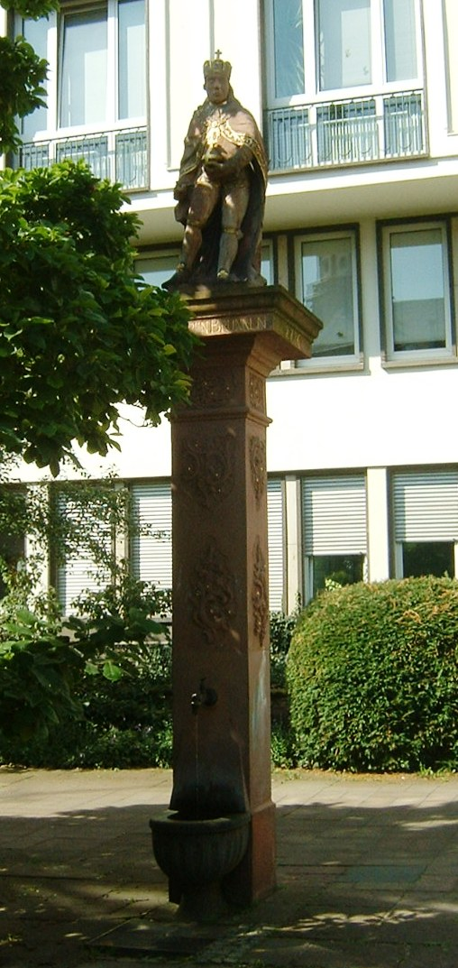 Fried-Lübbecke-Anlage in Frankfurt am Main Schöppnerbrunnen mit der Statue Franz I. des Künstlers und Bildhauers Johann Michael Datzerath von 1776.